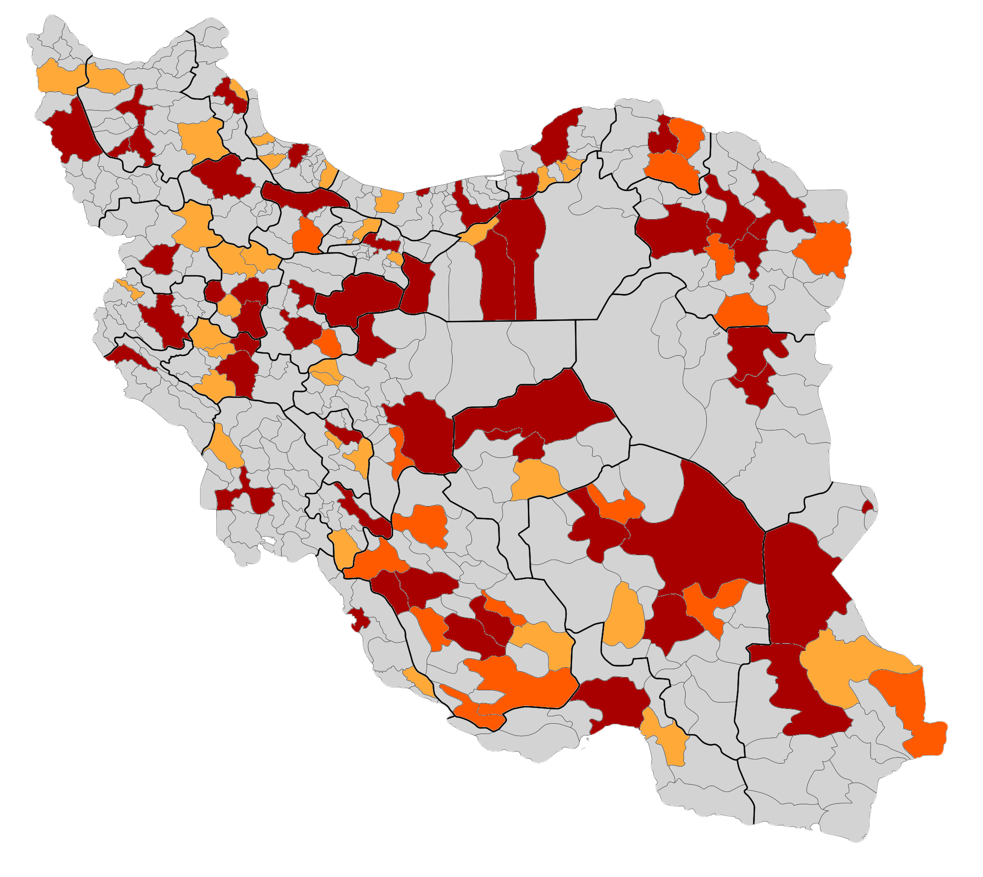 نقشه دانشگاه‌های جامع ایران به تفکیک شهرستان راهنما: دانشگاه مرکز آموزش عالی دانشکده اقماری پرونده اصلی:File:Iran_Counties.svg منبع:[1]